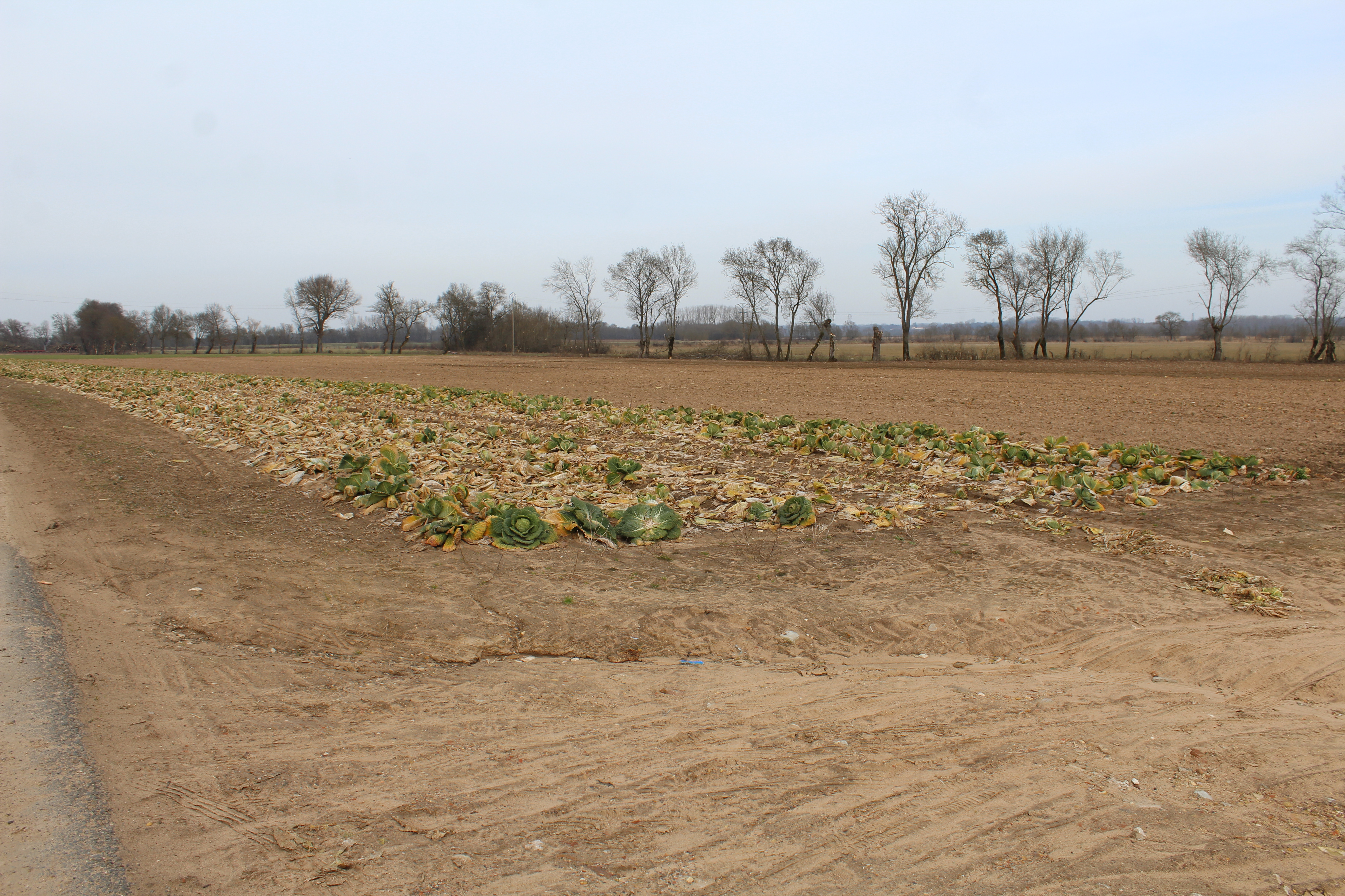 La prairie de la Saône à Vésines.